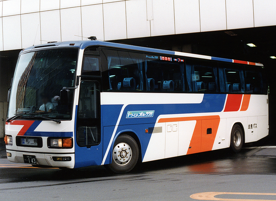 北見バス ドリーミントオホーツク号 三菱ふそう・エアロクィーンM U-MS729S